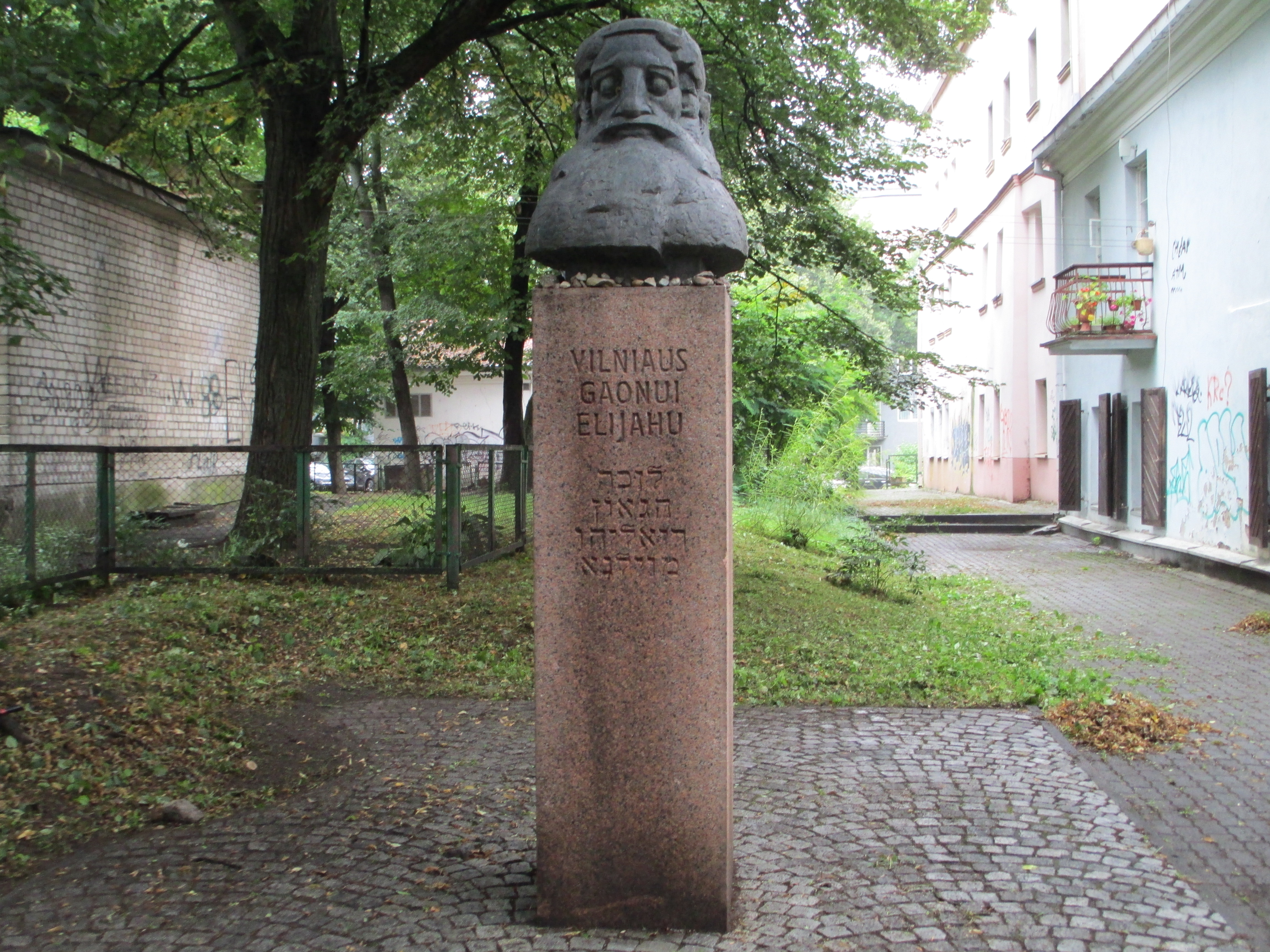 פסל של הגאון מווילנה במקום בו עמד ביתו, בווילנה